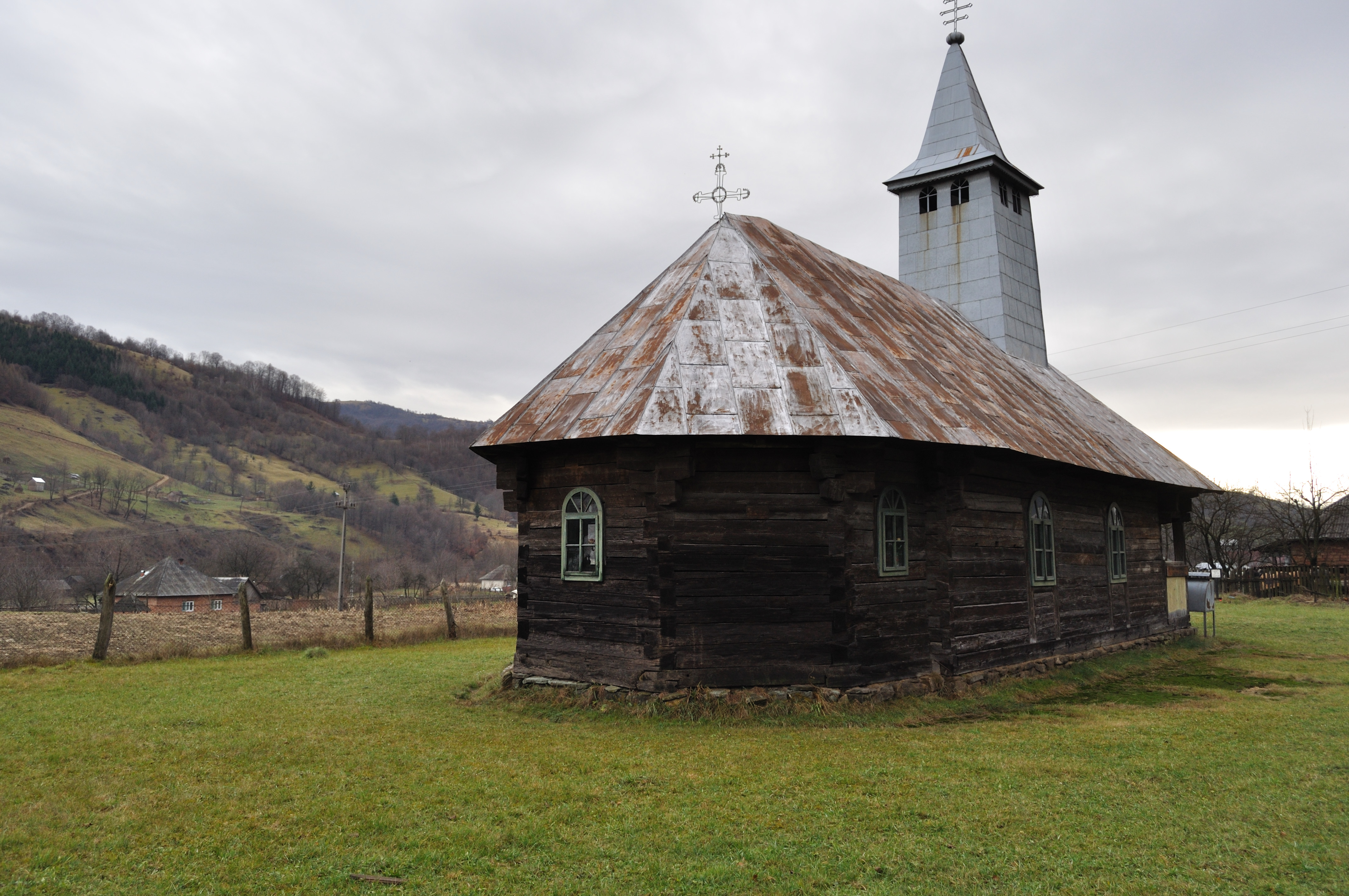 Biserica de lemn ucraineană din Ruscova